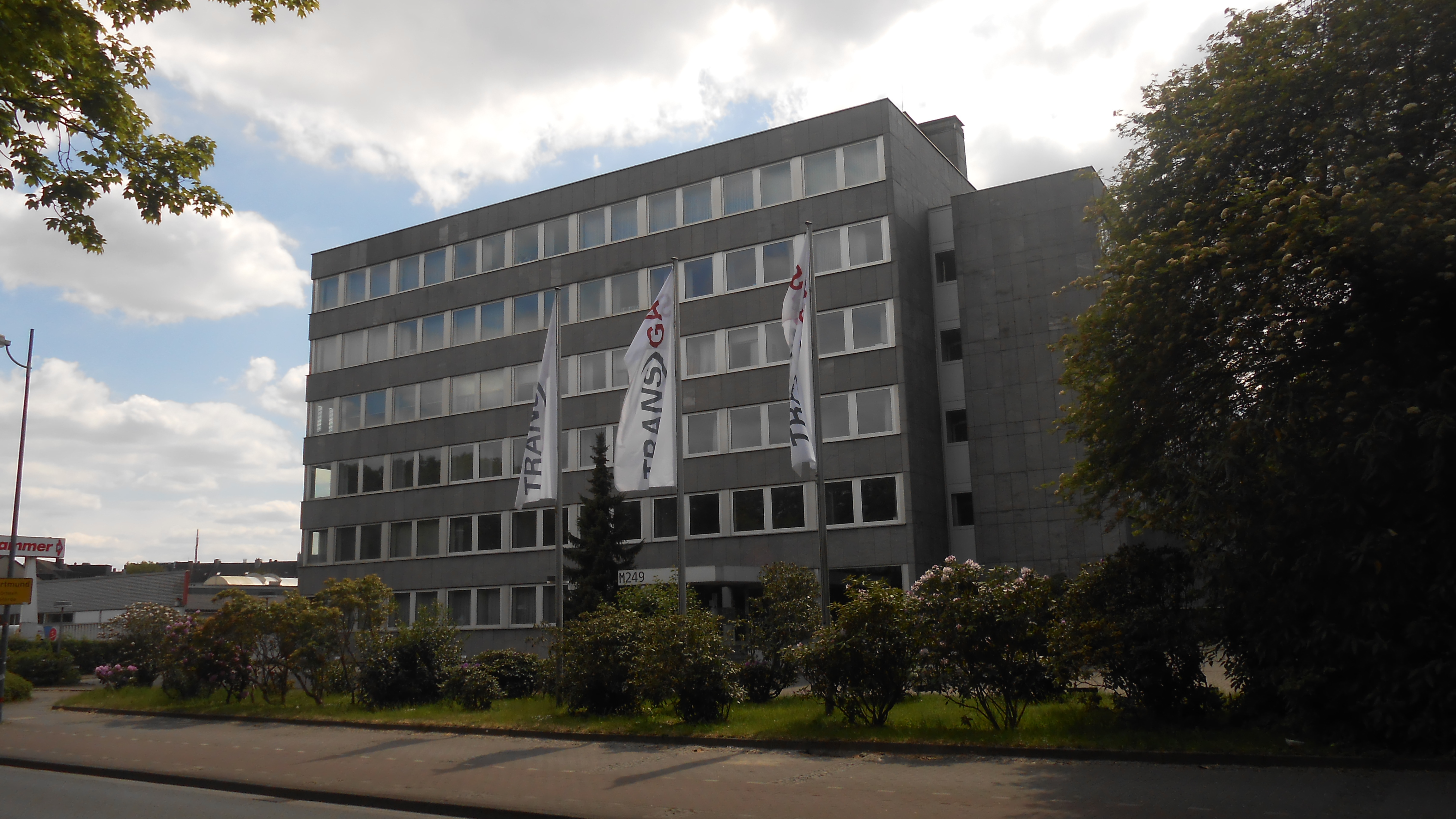 Verwaltungsgebäude des Hauptsitzes der TRANSGAS (Transgas Flüssiggas Transport und Logistik GmbH & Co. KG) an der Märkischen Straße in Dortmund.